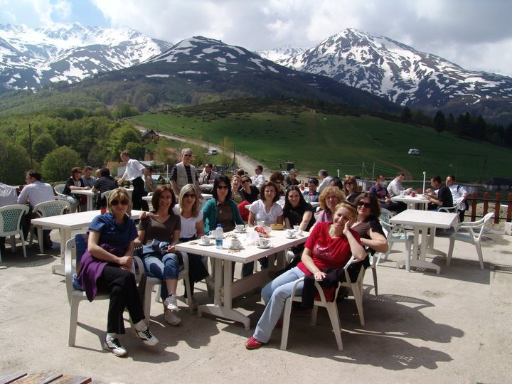 Prevalla dhe malet e Sharrit